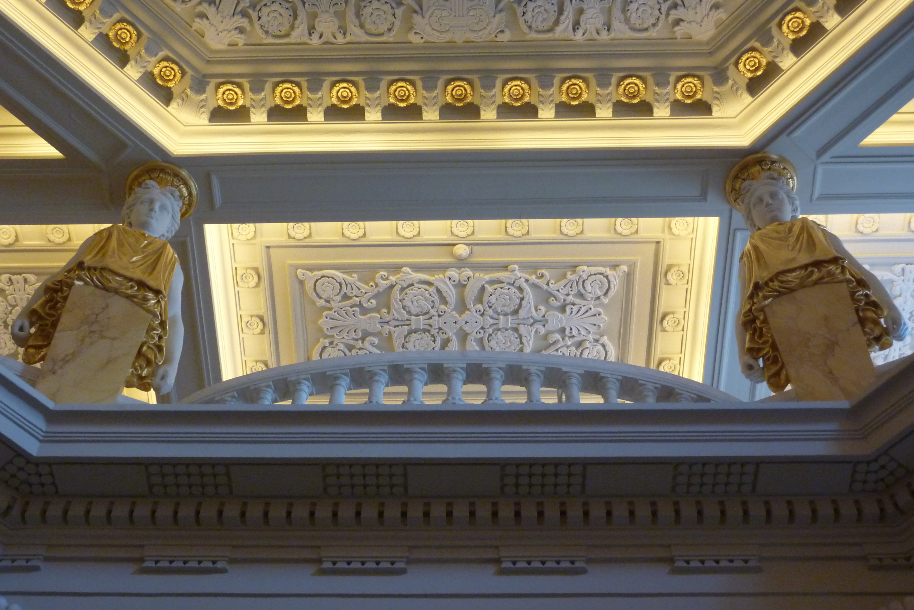 Théâtre de l'Odéon in Paris, Treppenhaus